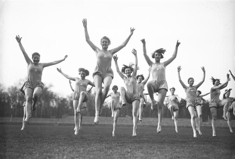 Moderner deutscher Frauensport! In der Logis-Schule in Hannover werden Frauen und Mädchen durch rythmischen Sport zu moderner Körper-Ertüchtigung ausgebildet. Früh um 8 Uhr beginnen bei schönem Wetter die rythmischen Uebungen im Tanzen und Springen, um dem Körper Grazie und Anmut zu verleihen. Schülerinnen der Logis-Schule beim Morgentraining.